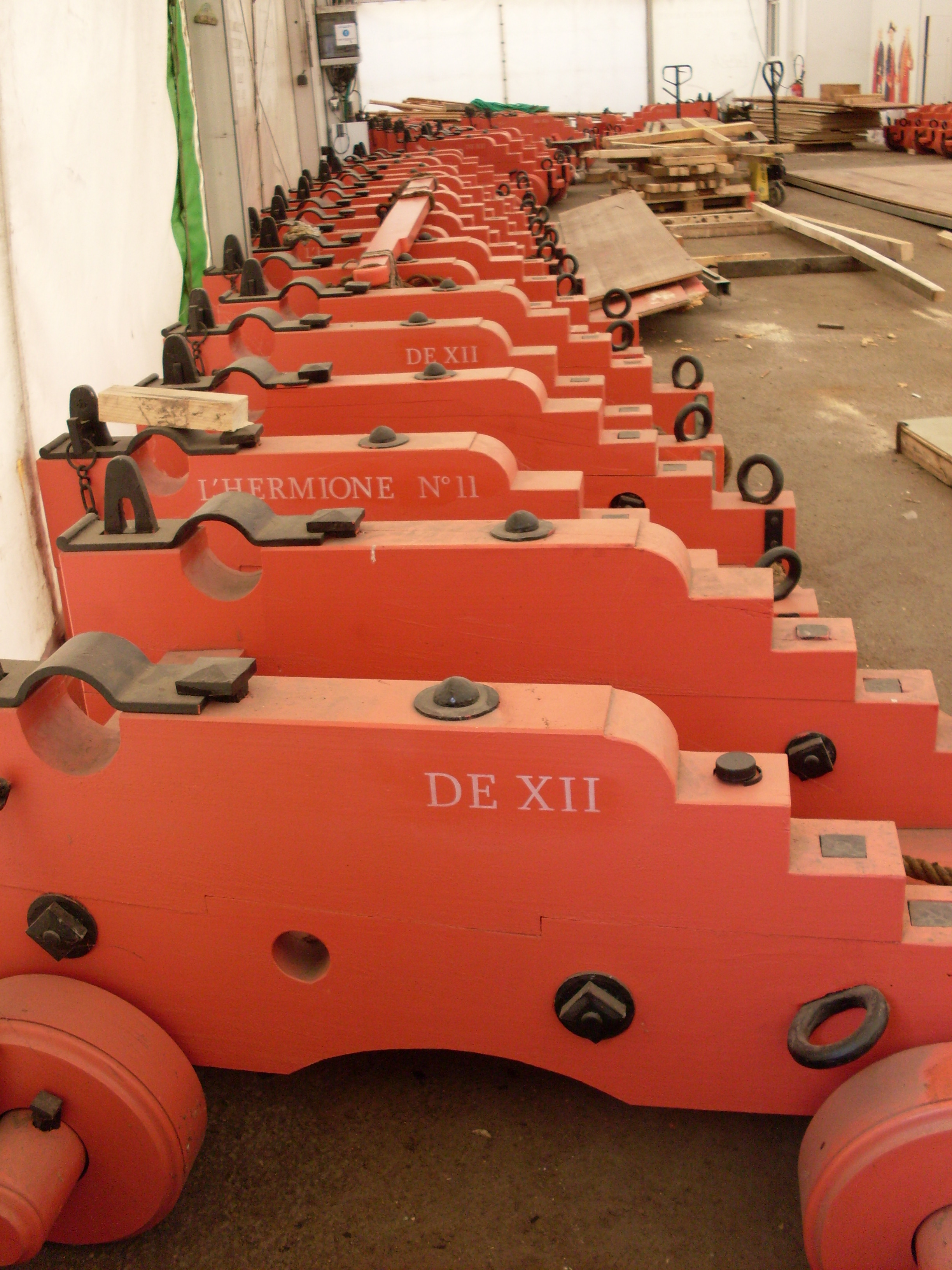 Le chantier de l'Hermione en juin 2011 - chariots de canon